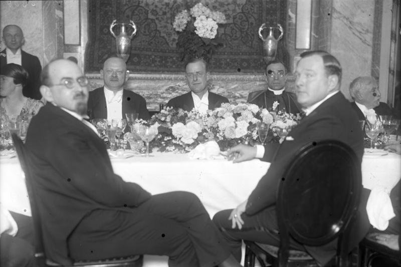 Der französische Berichterstatter und Berliner Vertreter des Pariser Journal Georges Blun, welcher einen entstellten Artikel über die Sylversternacht in Berlin in einem Pariser Blatt veröffentlichte, hat seinen Vorsitz im Verein der ausländischen Presse niedergelegt und einen Entschuldigungsbesuch in der Presseabteilung der Reichsregierung getan. - Georges Blun, der Berliner Vertreter des Pariser Journal.